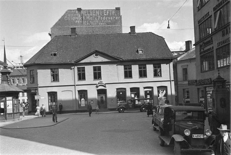 Brogården i Brugata 22. Huset ble bygd ca 1800 og var nummerert som del av Brugata, men orientert mot Lilletorvet. Fra 1880 vekslet bygningen mellom å huse skjenkesteder, restauranter og avholdskafeer. Revet i 1971.